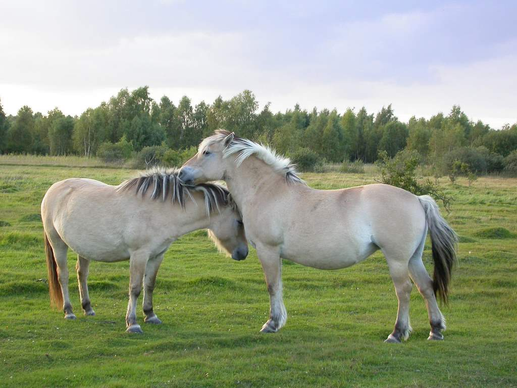 Norwegian fjord horses grooming